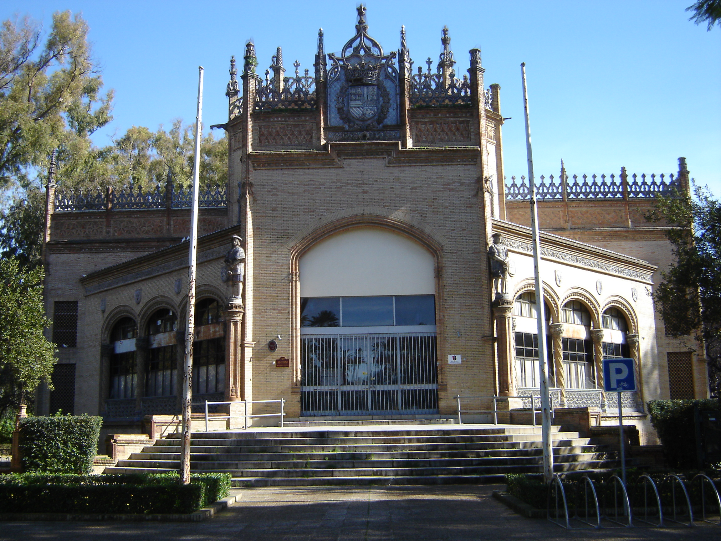 Pabellón Real (Plaza de América). Parque de María Luisa (Sevilla).